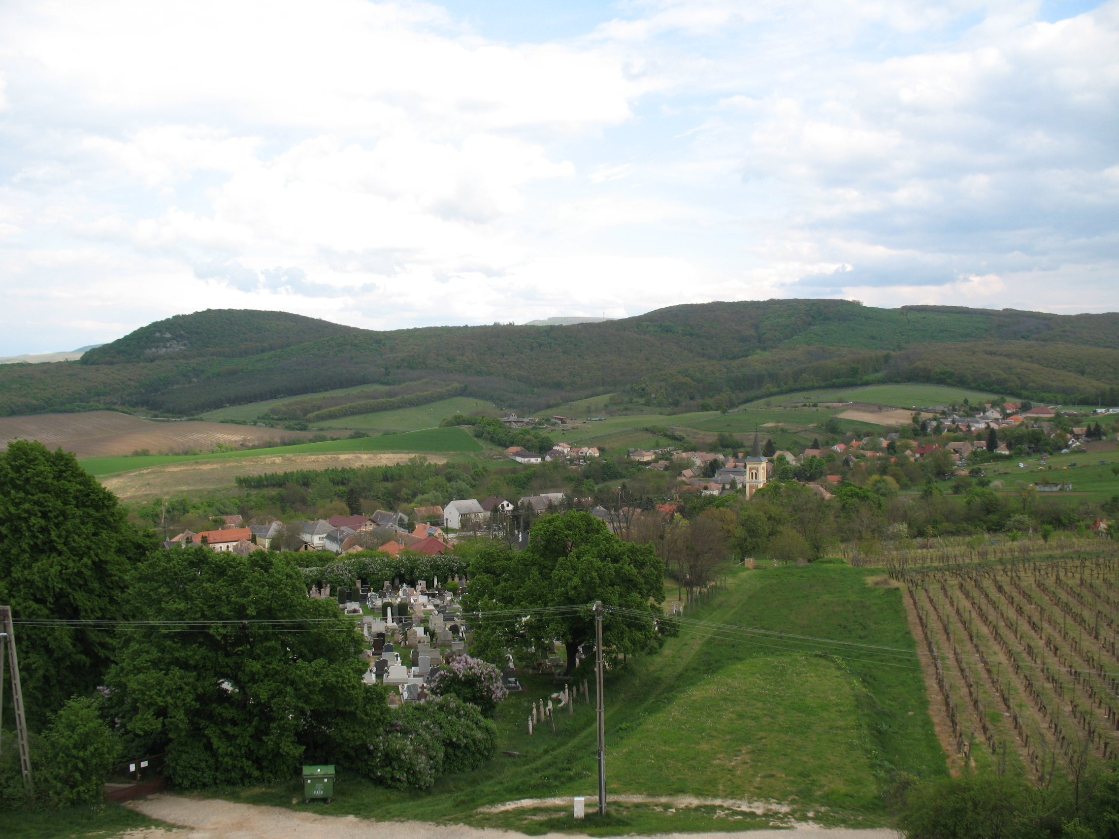 Dunaszentmiklós